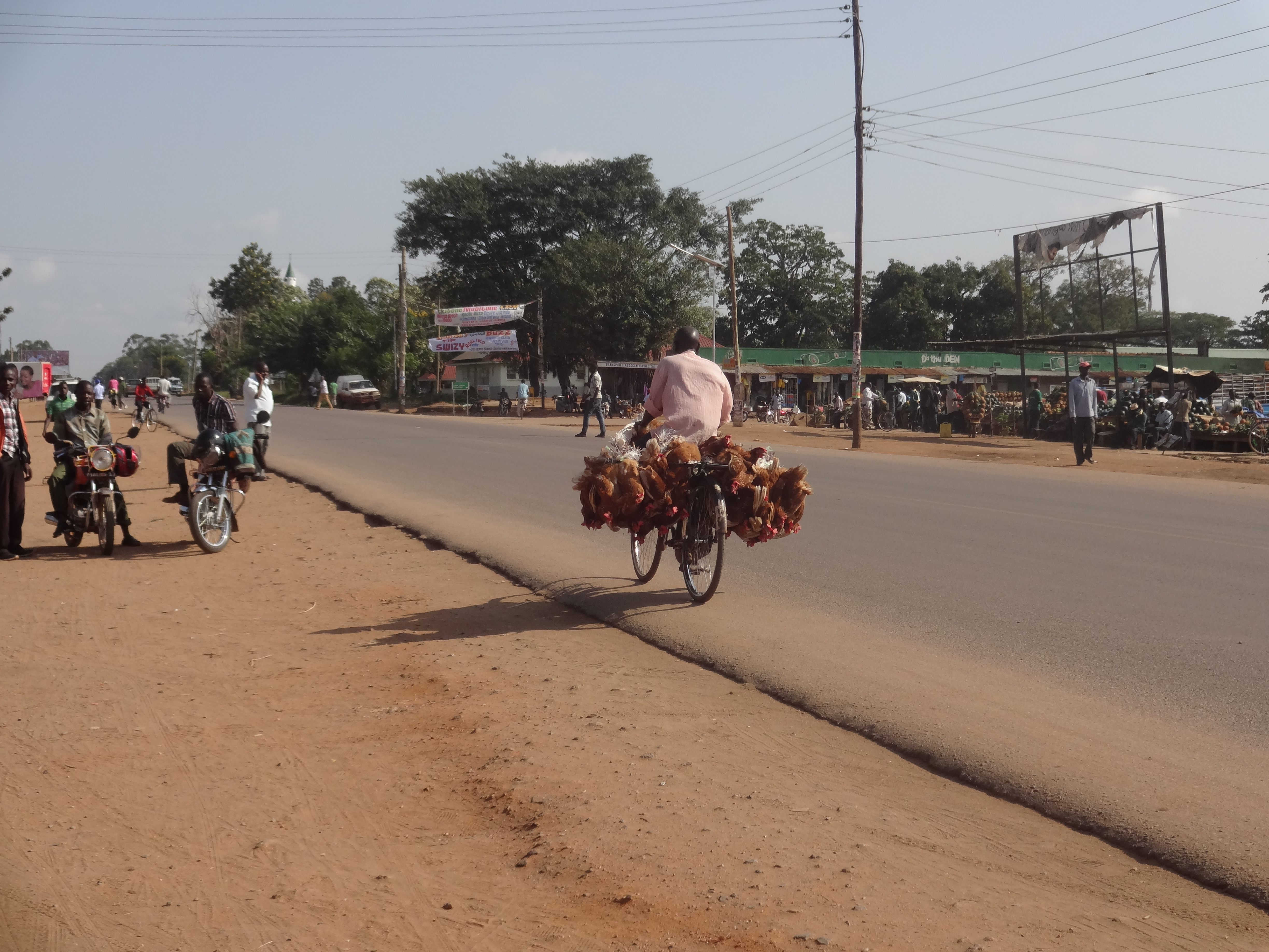 שוק מקומי באזור הכפרי